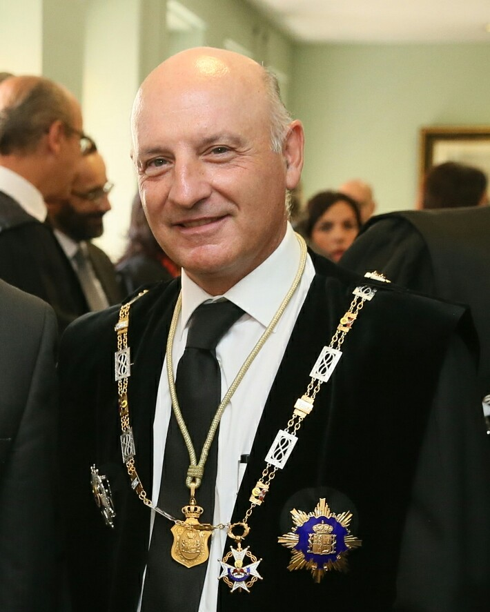 Vicente Manuel Rouco Rodríguez, presidente del Tribunal Superior de Justicia de Castilla-La Mancha.